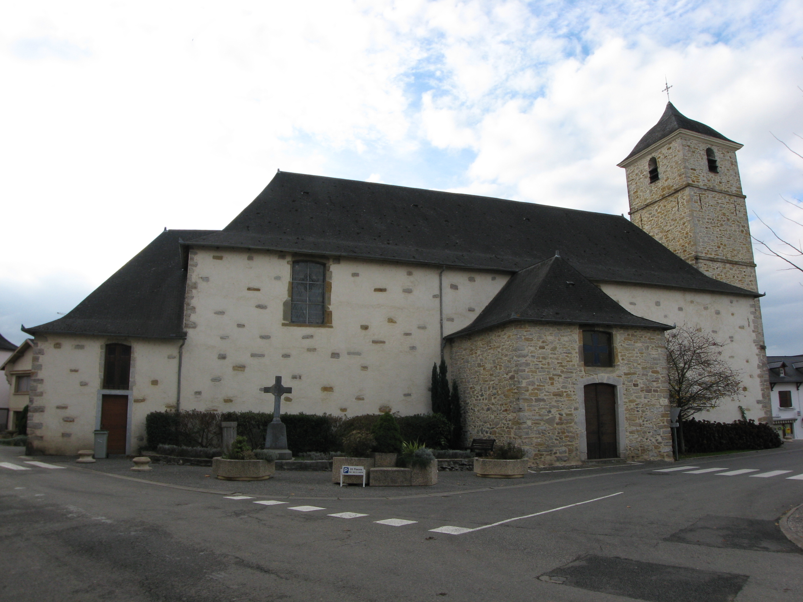 Eglise Saint Jean Baptiste de Moumour (Pyrénées-Atlantiques) (Pyrénées).